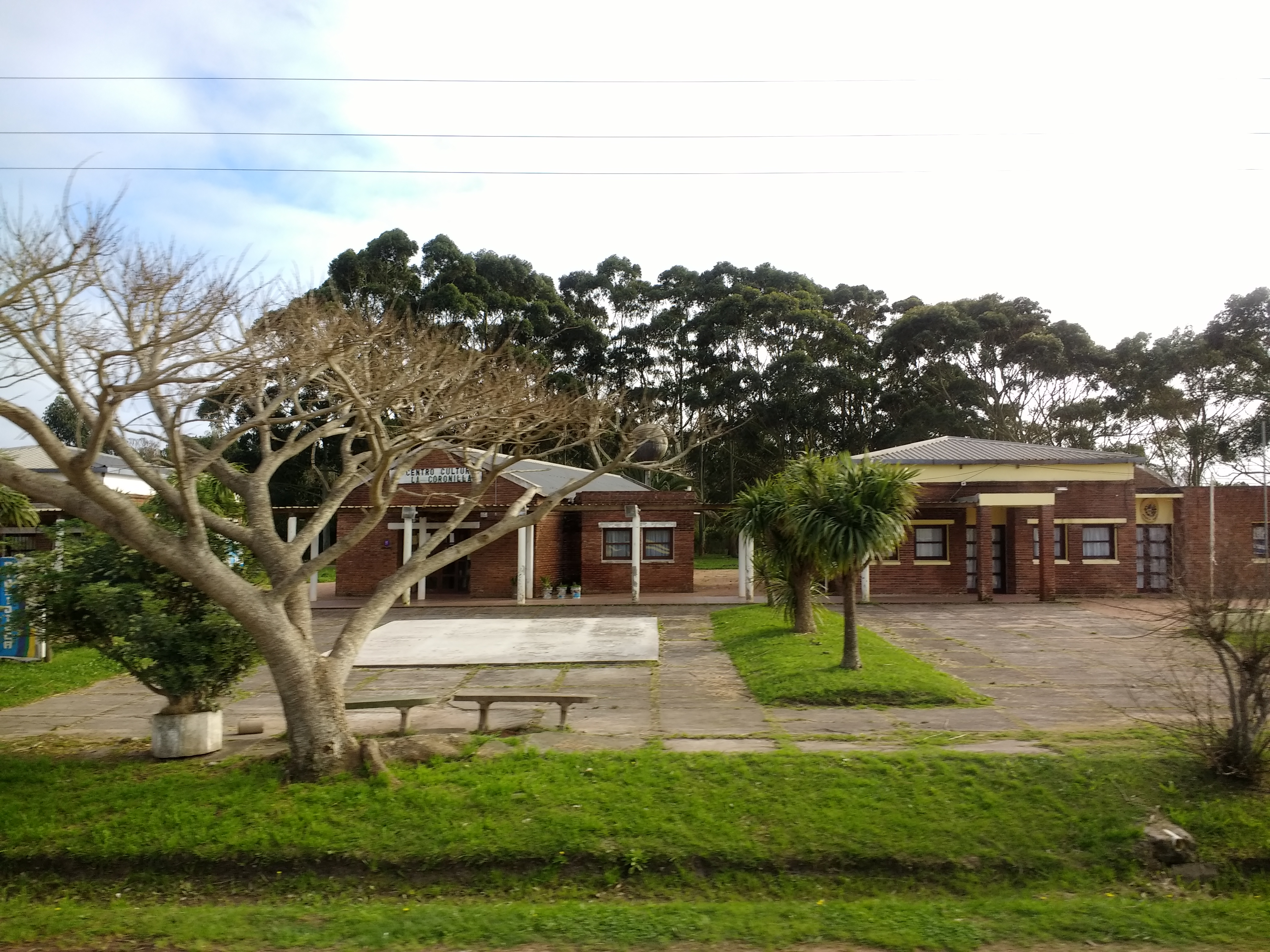 La Coronilla, Rocha.